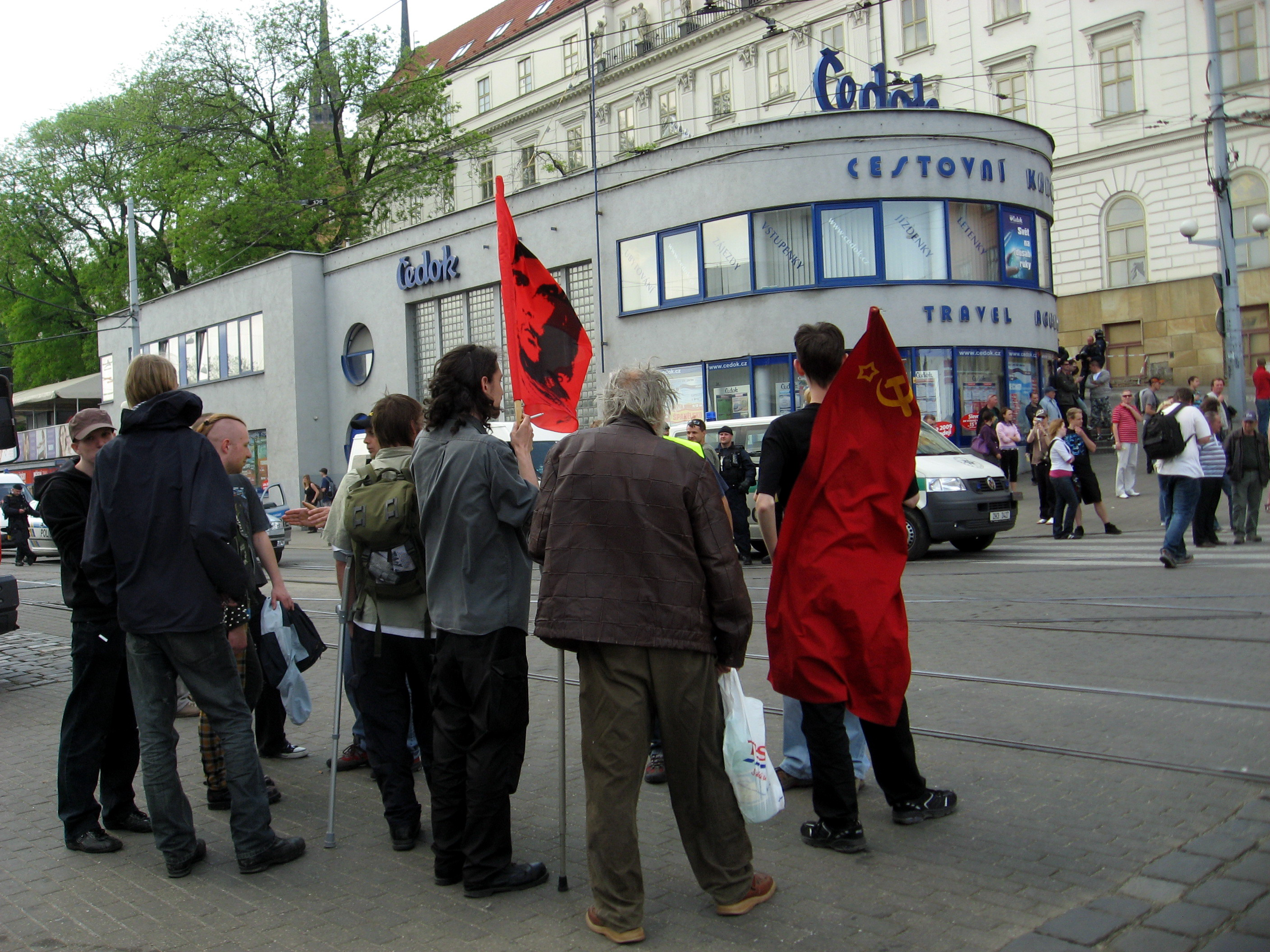 Členové Komunistického svazu mládeže diskutují s policií